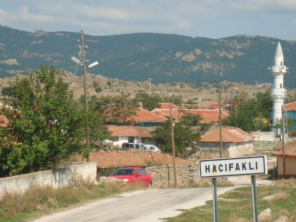 Hacıfaklı Köyüne Pınarhisar yönünden girişi